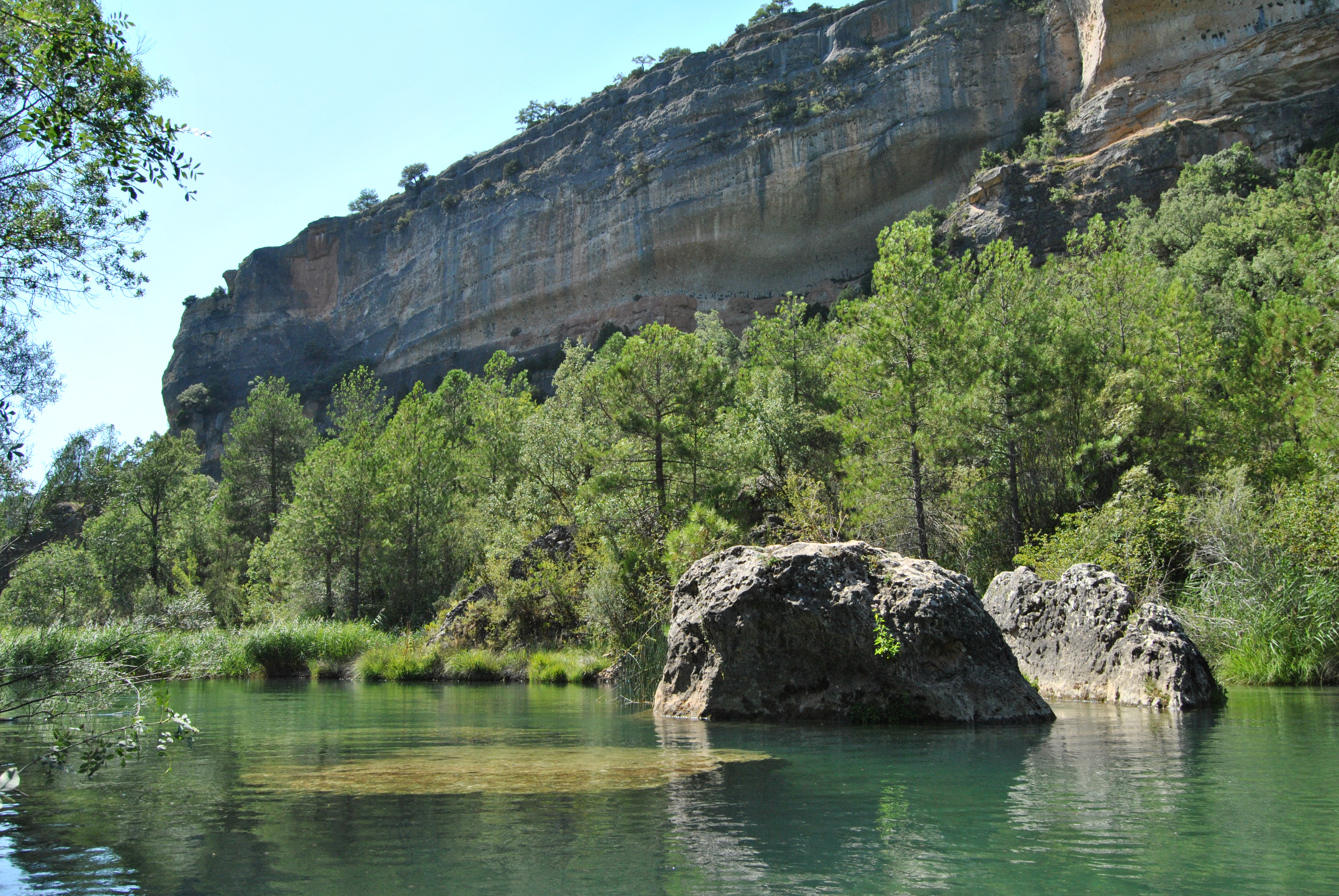 Río Júcar - Cortados de Villalba - Cuenca - Spain